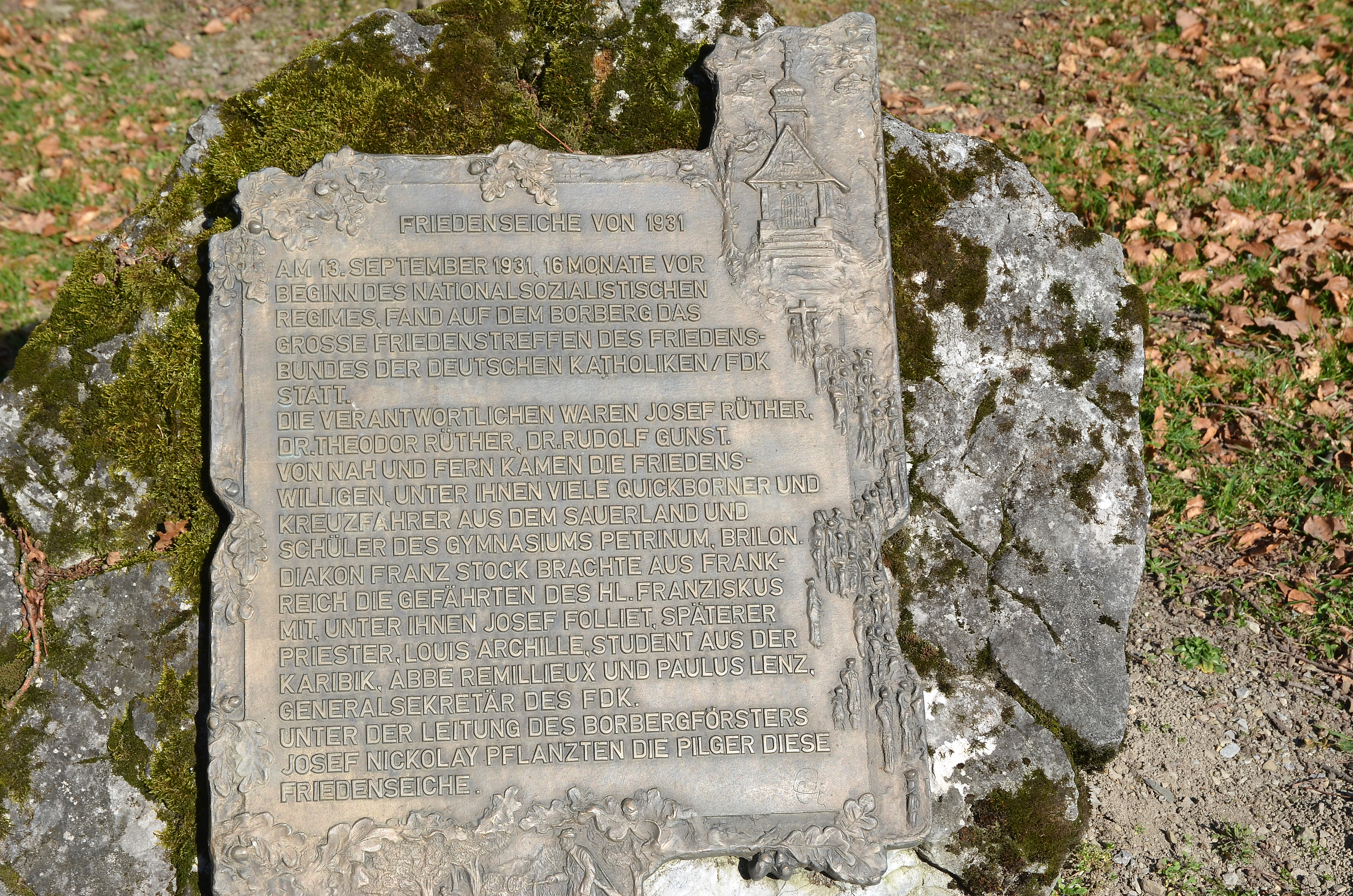 Brilon, Borberg, die Friedenseiche, Gedenkstein